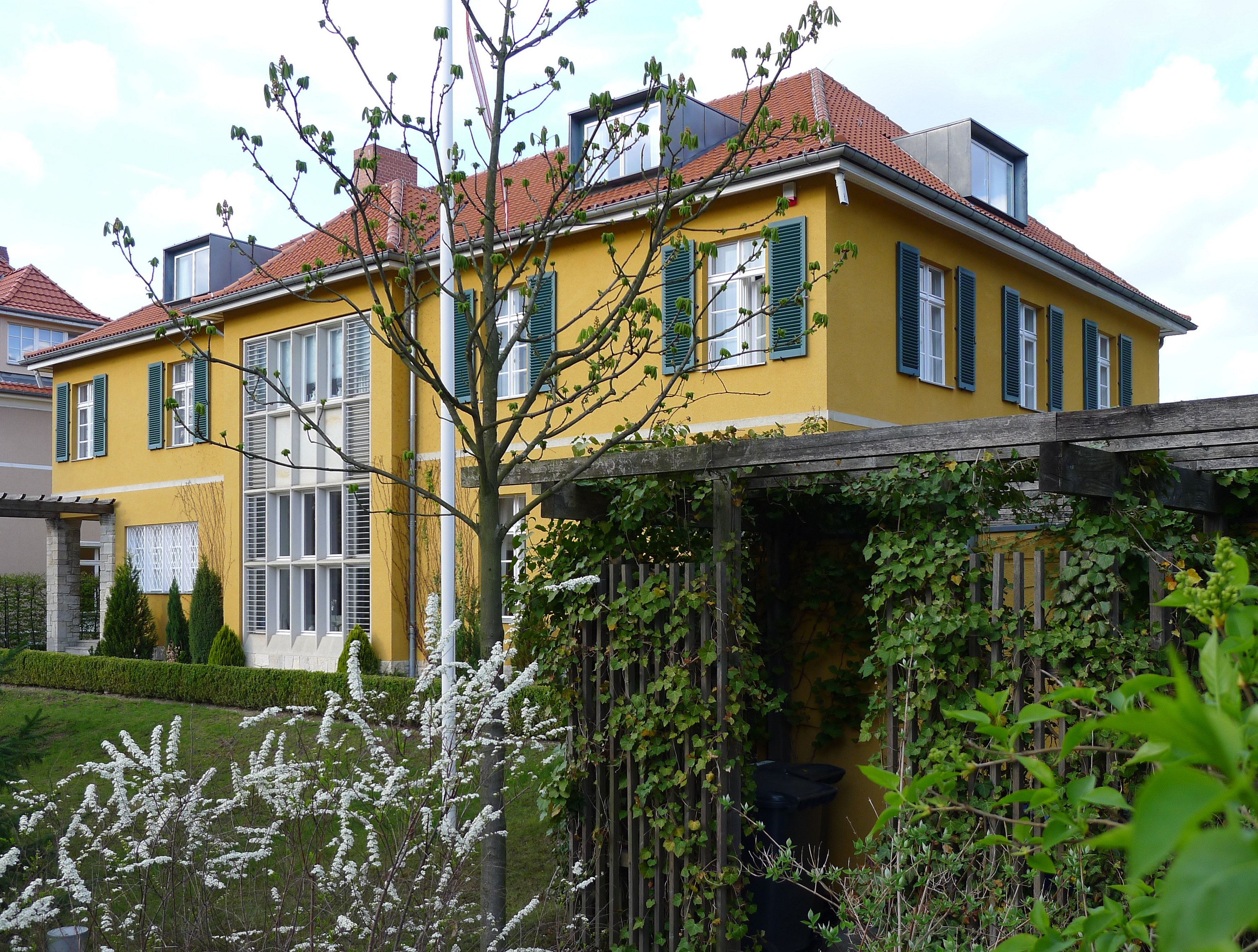 Villa